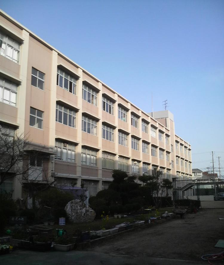 神戸市立星和台中学校本館